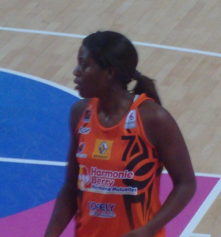 La basketteuse française Endy Miyem